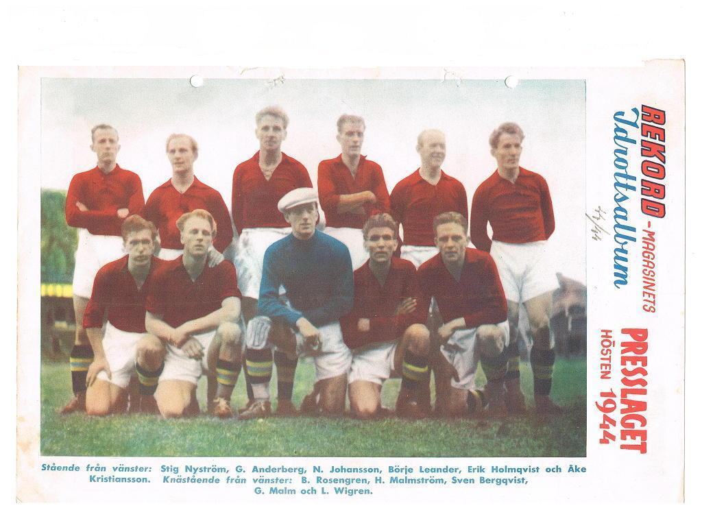 Presslaget den 5 november 1944 mot Sveriges landslag.